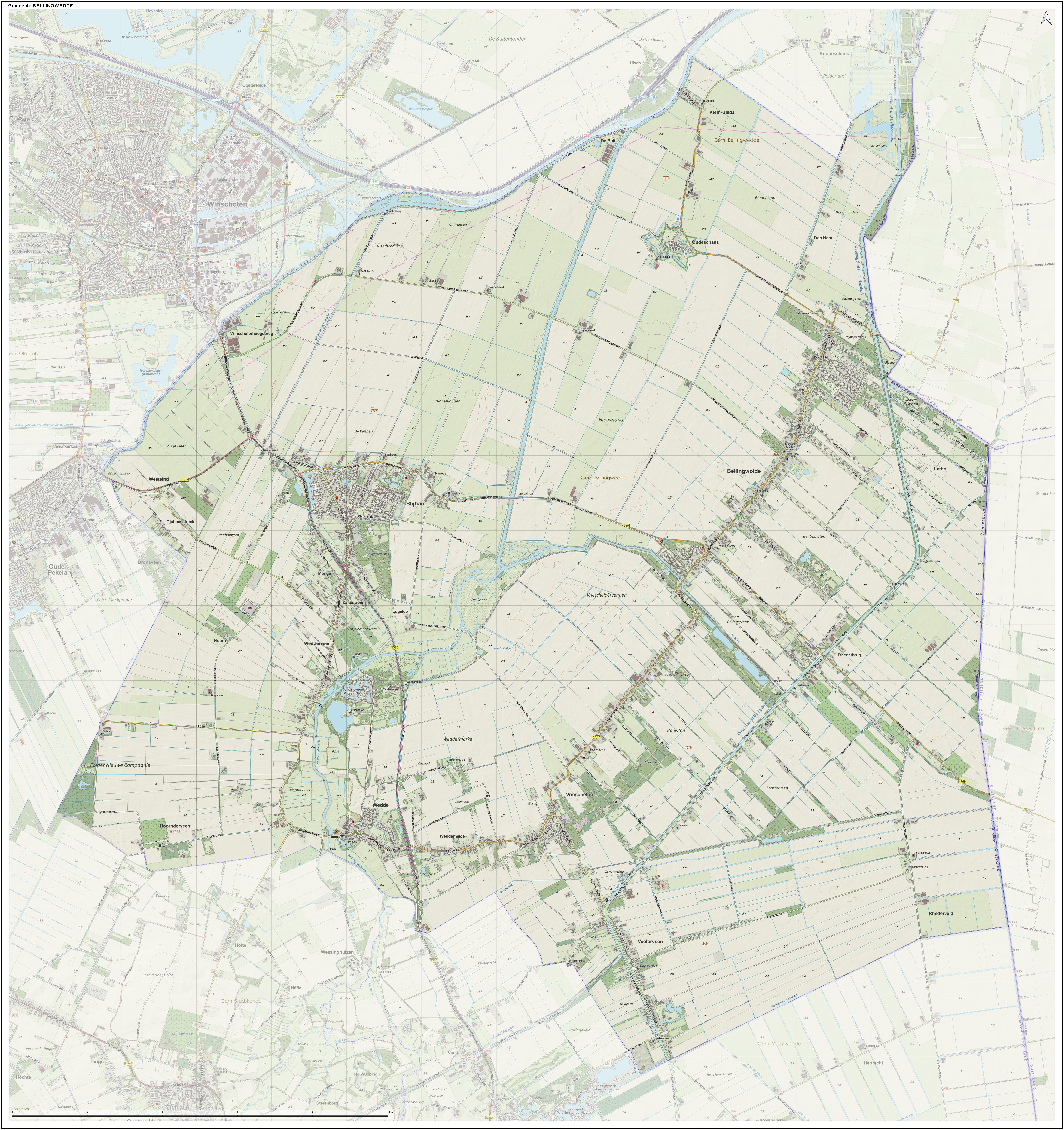 Topografische gemeentekaart. Resolutie: 400 pixels/km. Kaartbeeld samengesteld uit de open geodata van de Top10NL en Top25namen (Kadaster), Creative Commons-BY licentie. Gebouwvlakken uit open geodata BAG extract. Wegen uit de OpenStreetMap, OpenStreetMap community. Reliëfschaduw uit de Actuele Hoogtekaart AHN2. Samenstelling en kleurenschema: Jan-Willem van Aalst, met QGIS. Zie ook de Legenda.